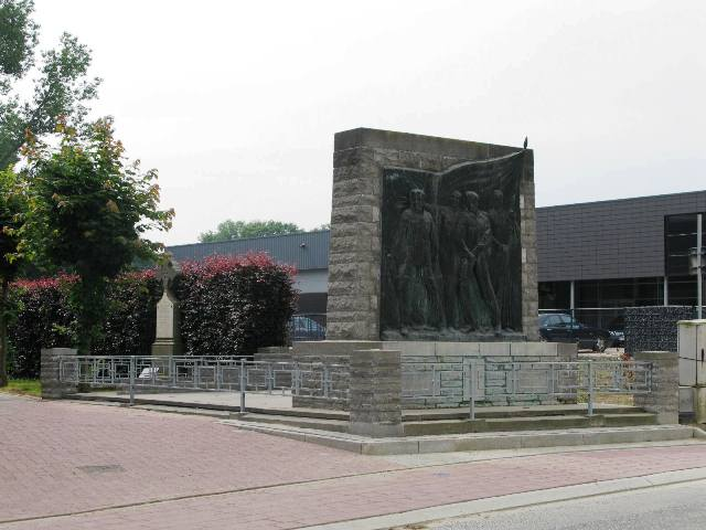 Nieuwerkerken Grotestraat zonder nummer